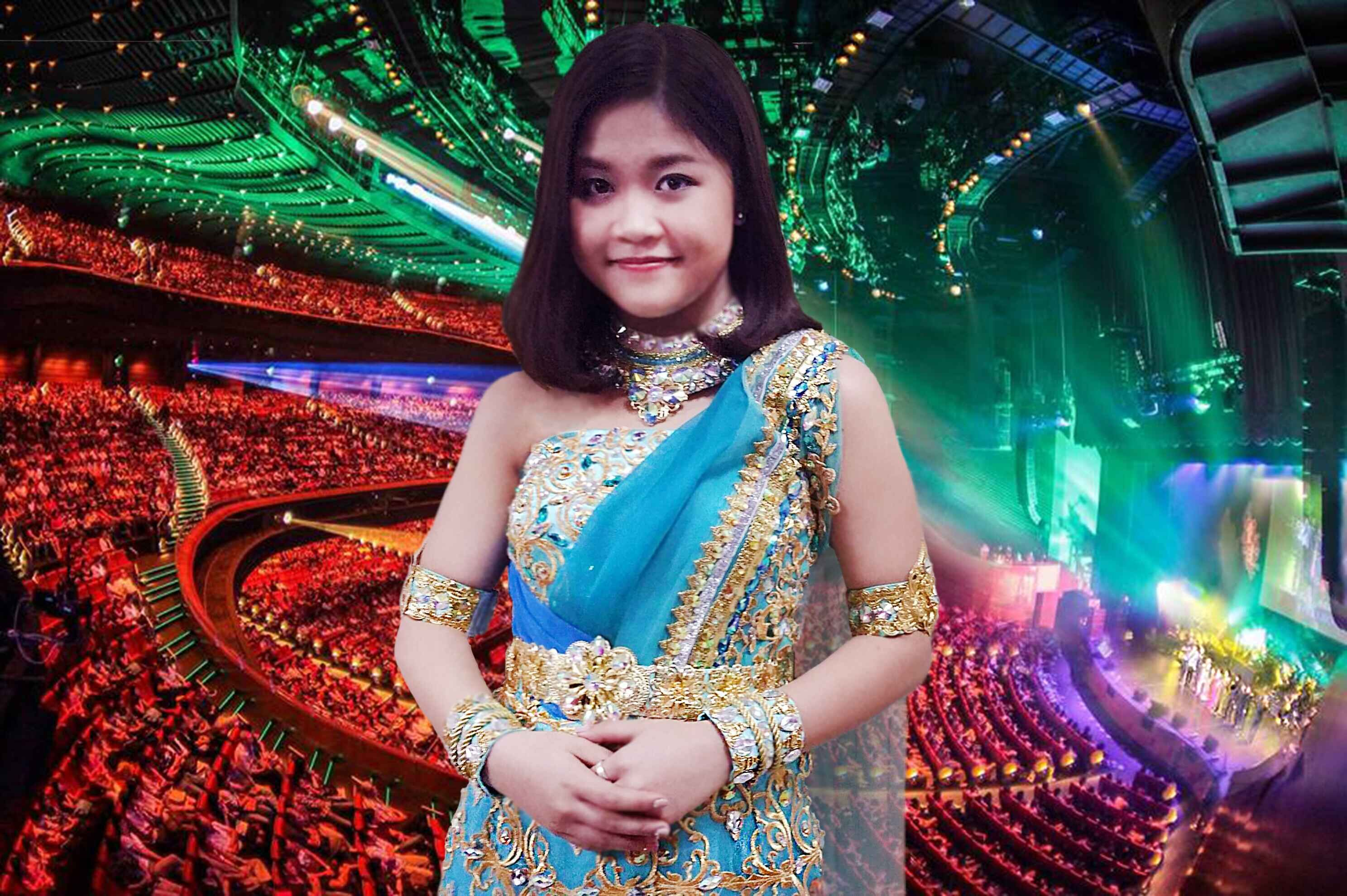 泰國華裔女歌手朗嘎拉姆